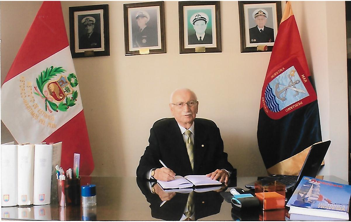 Director